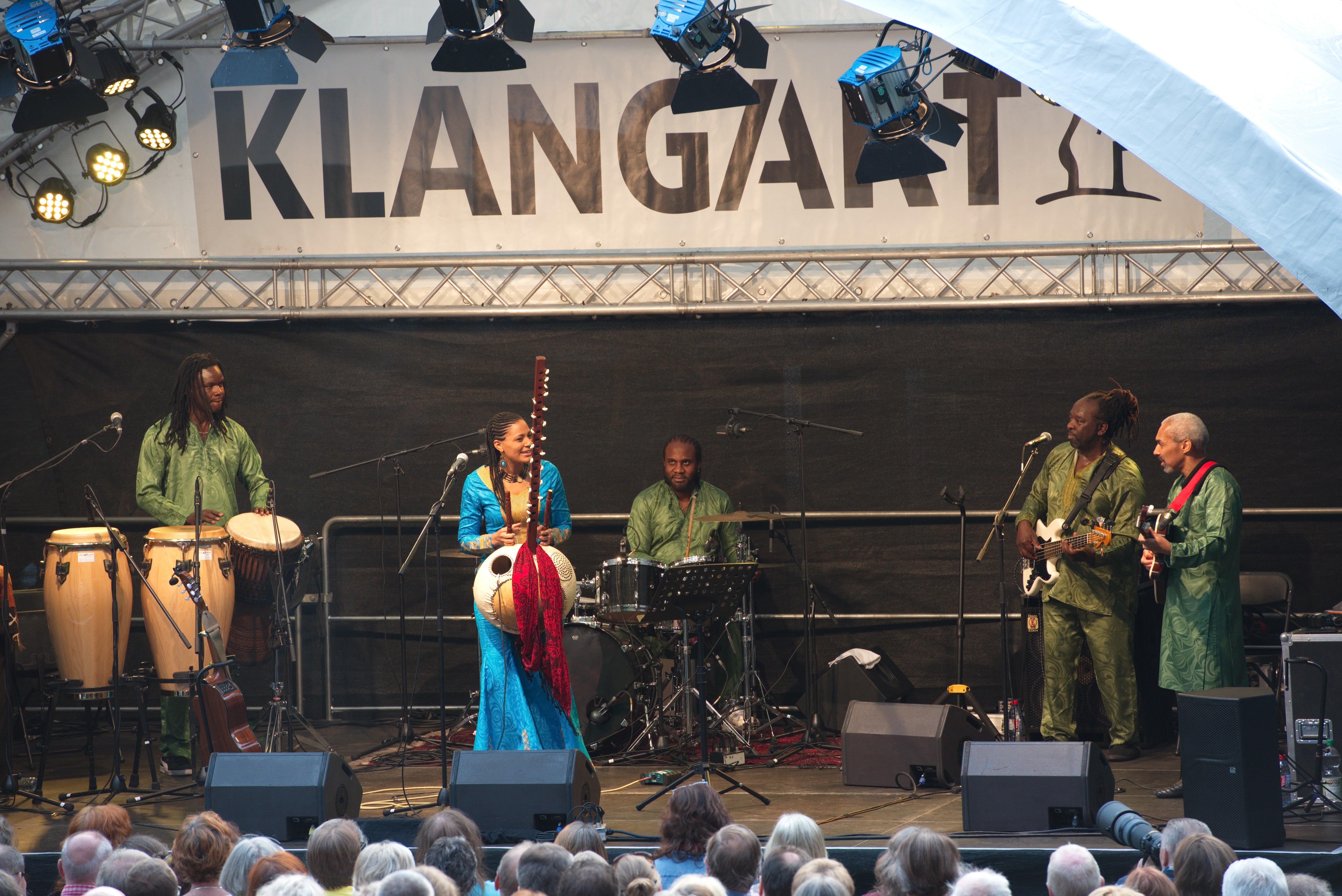 Open-Air-Konzert von Sona Jobarteh; Tournee "Fasiya" im Skulpturenpark Waldfrieden, Wuppertal